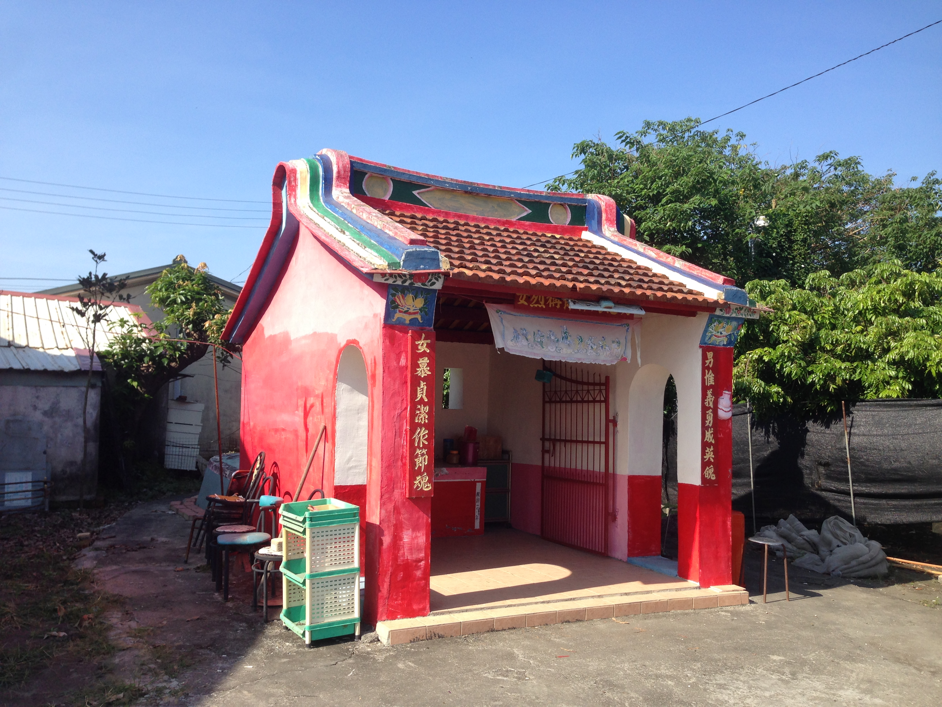 里港紅廟斜照